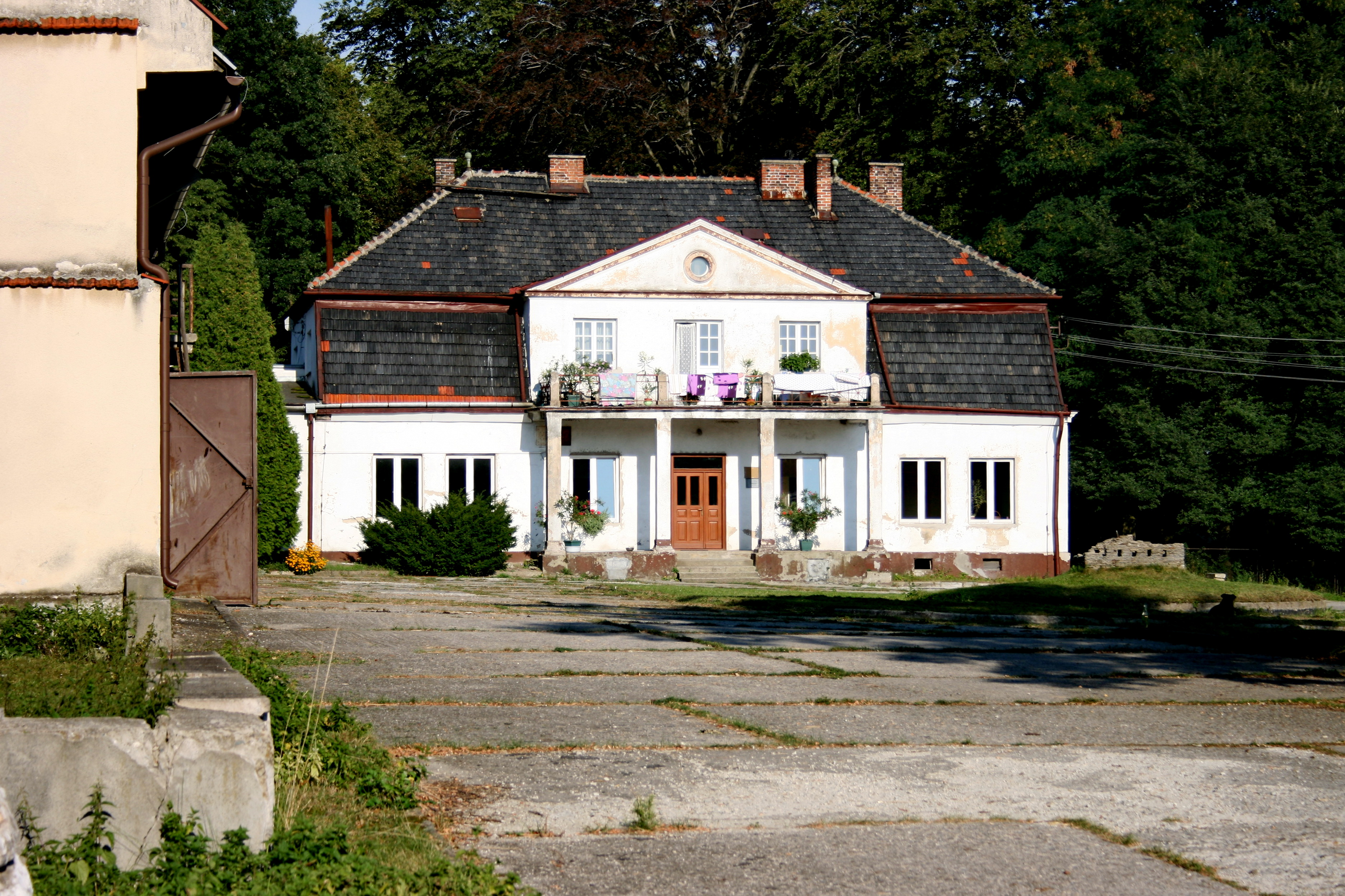 Dwór w Polance Hallera (zabytek nr rejstr. A-607/M)